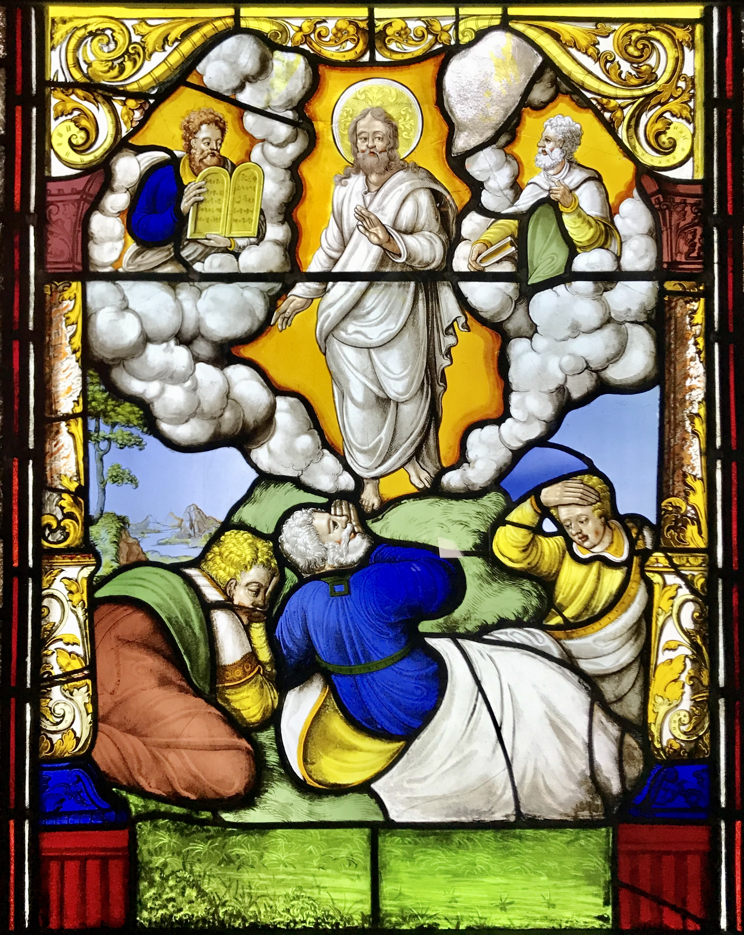 Das Christusfenster im Kölner Dom im Erdgeschoss des nördlichen Querhauses zeigt Szenen aus dem Leben Christi. Szene: Verklärung Christi auf dem Berg Tabor. (1562)